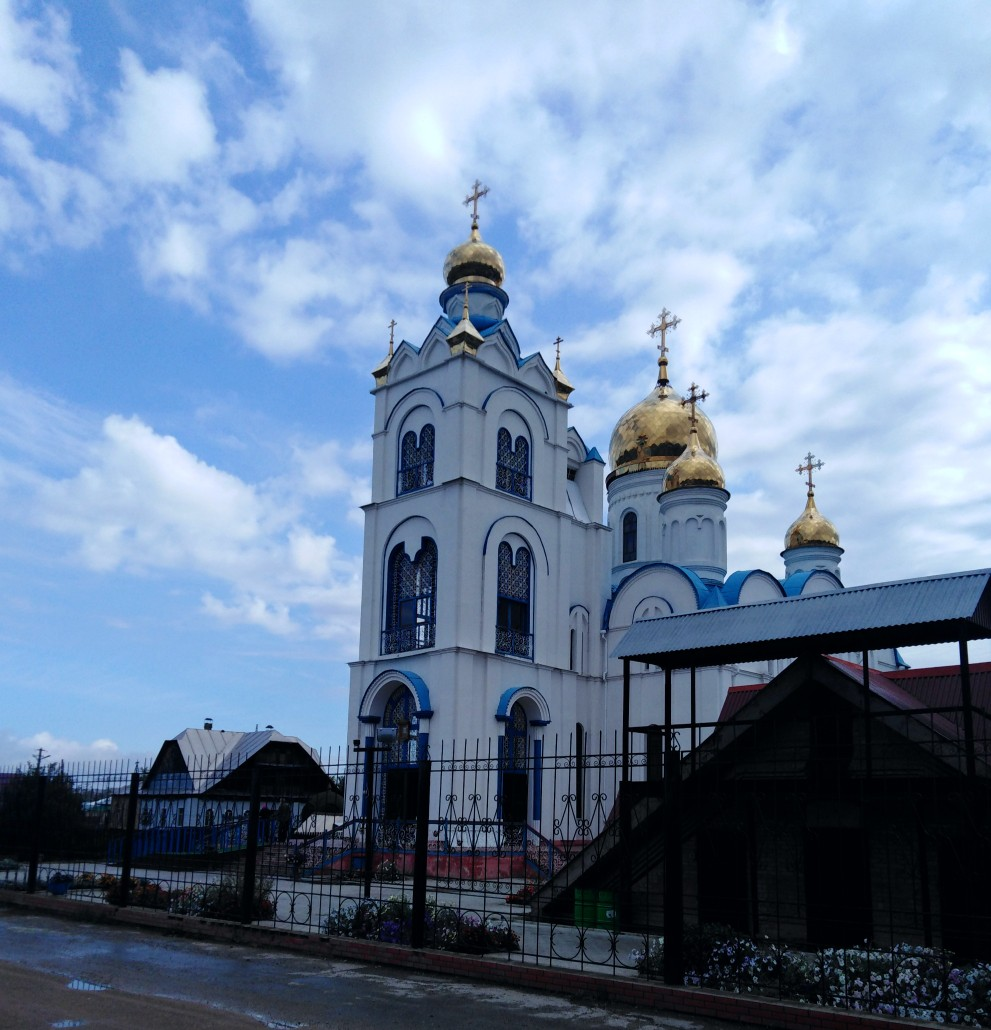 Храм Табынской иконы Божией Матери г. Похвистнево: улица Щербакова, 7., Похвистневский, Самарская область.